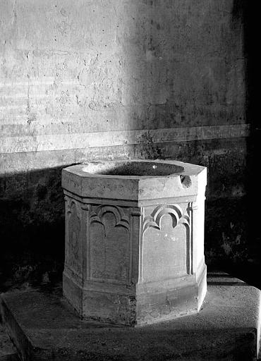 Taufbecken in der Kirche Saint-Martin in Jugazan